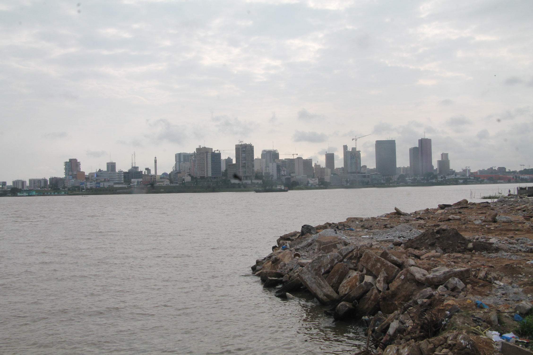 La belle ville d'Abidjan vue du coté de Blauckauss